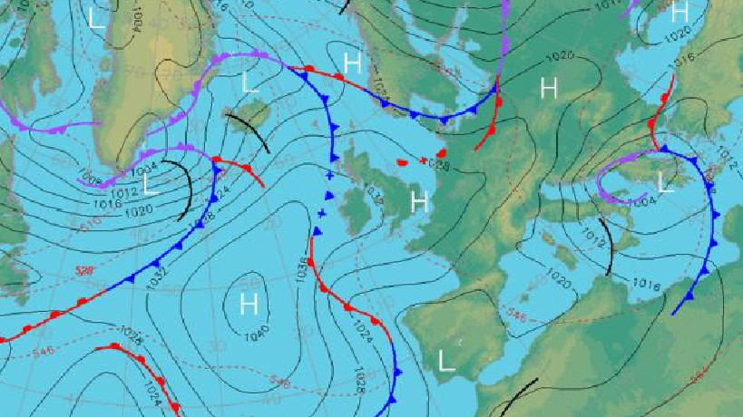 pantano barométrico